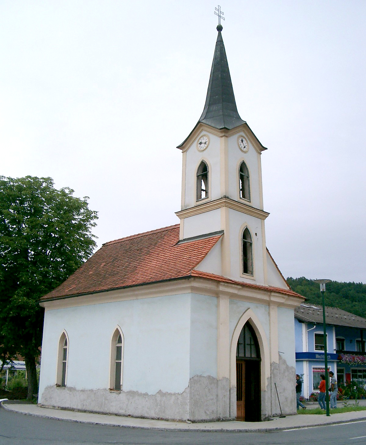 Ortskapelle